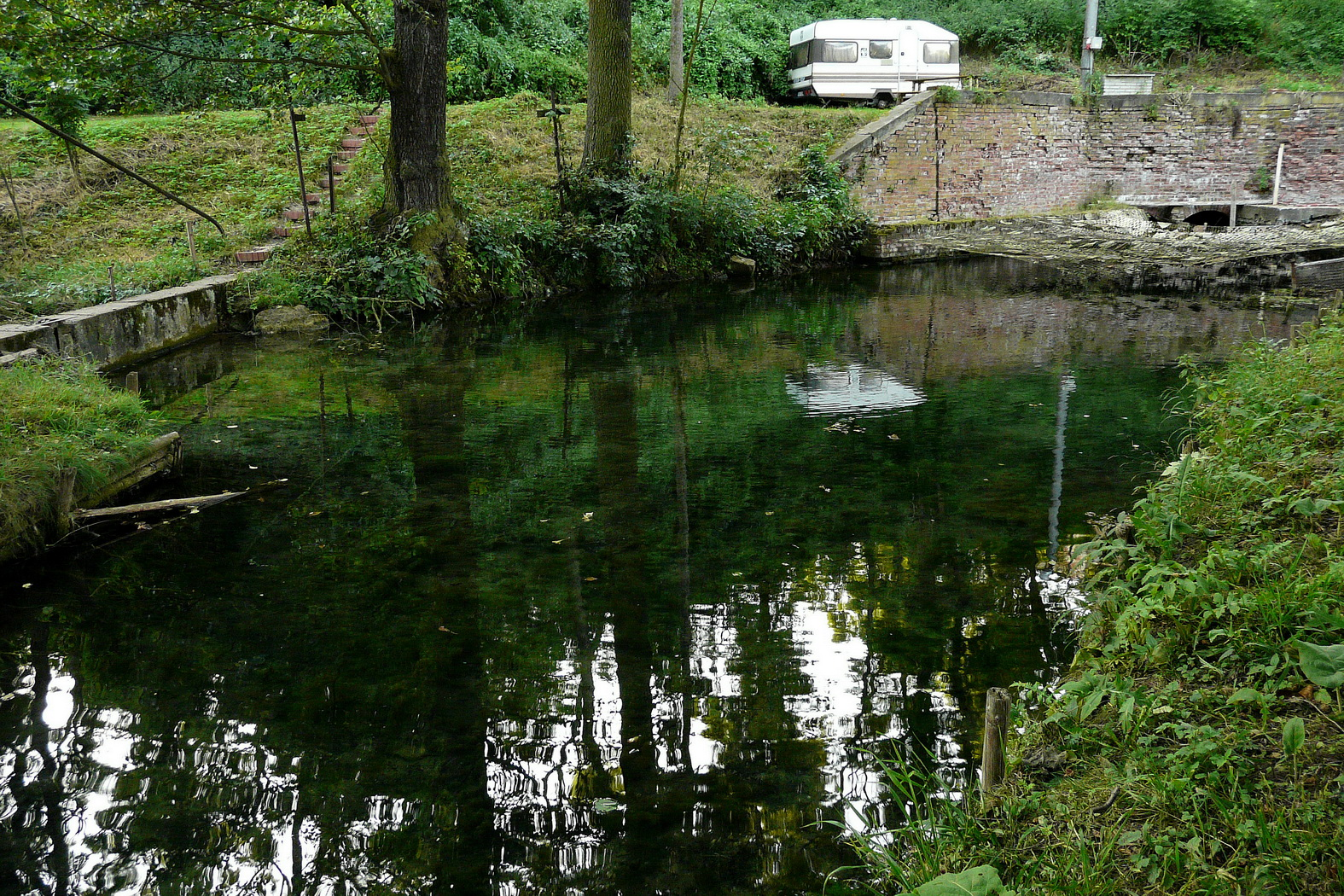 Pramenná nádrž u Kropáčovy Vrutice, přítok Košáteckého potoka